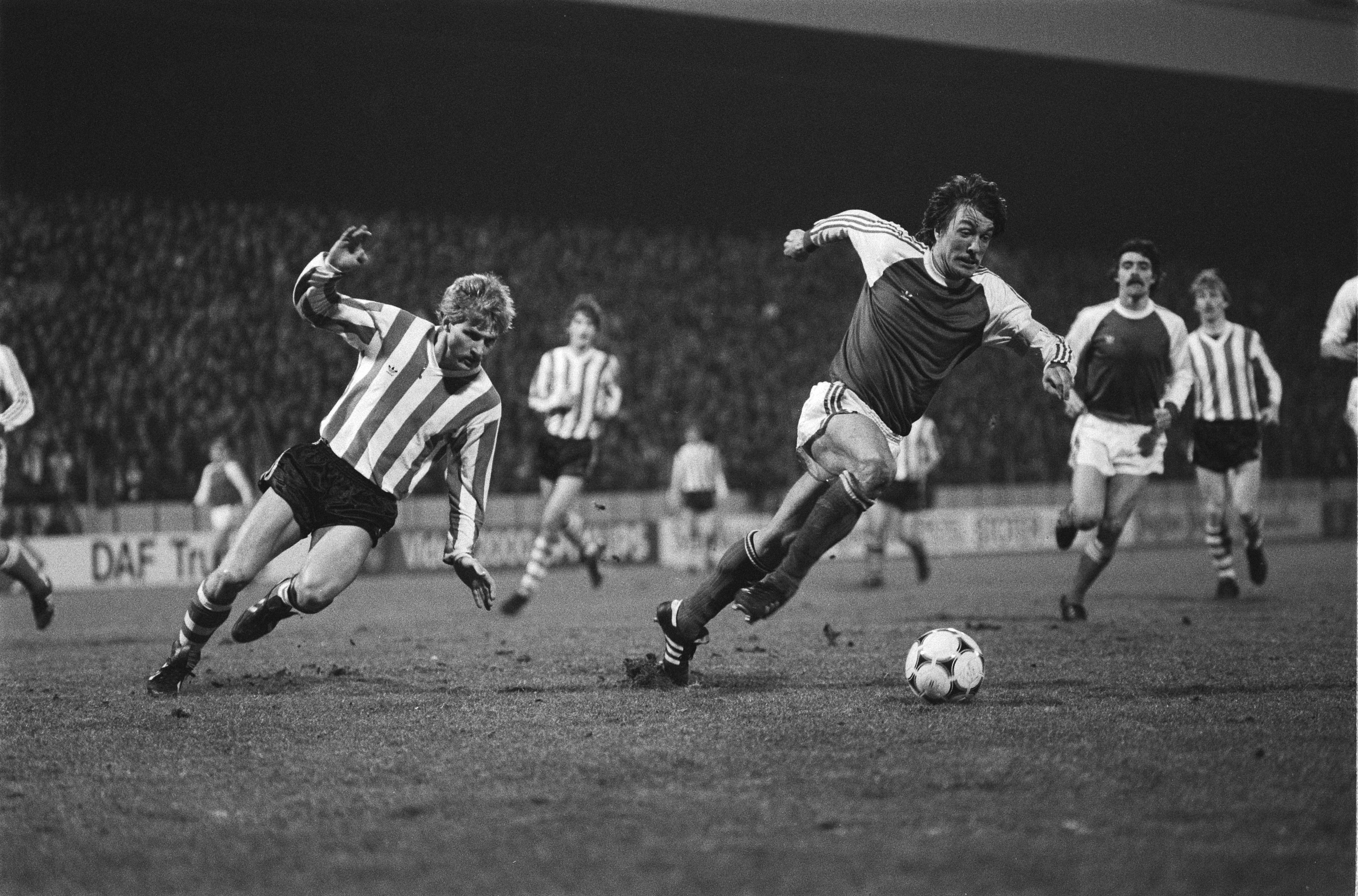 Collectie / Archief : Fotocollectie Anefo Reportage / Serie : [ onbekend ] Beschrijving : PSV tegen Feyenoord 1-2. Wijnstekers in duel met Thoresen van PSV Datum : 13 maart 1982 Trefwoorden : sport, voetbal Instellingsnaam : Feyenoord Fotograaf : Dijk, Hans van / Anefo Auteursrechthebbende : Nationaal Archief Materiaalsoort : Negatief (zwart/wit) Nummer archiefinventaris : bekijk toegang 2.24.01.05 Bestanddeelnummer : 932-0386